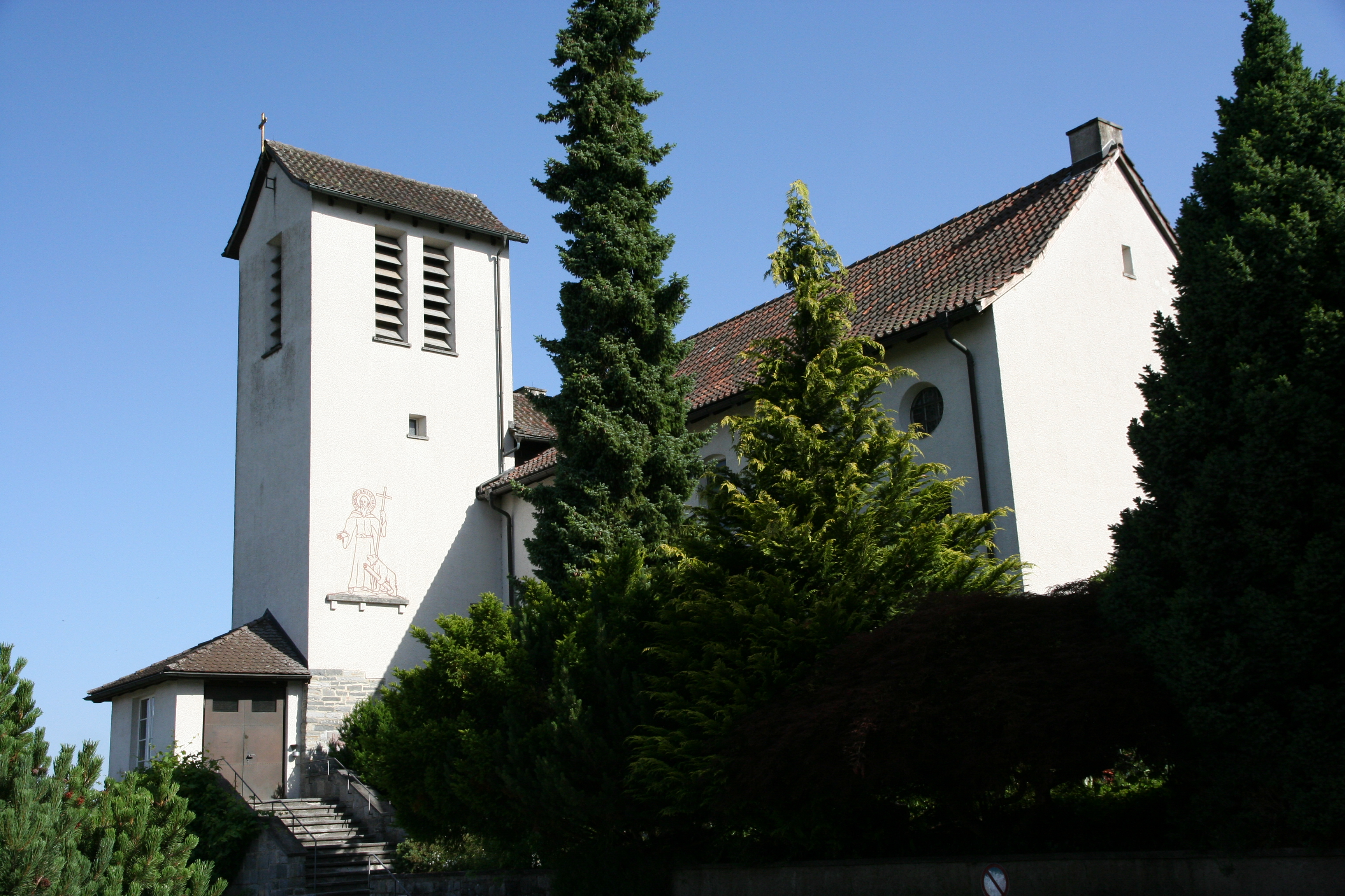 Römisch-katholische Kirche Liebfrauen Oberstammheim, Aussenansicht